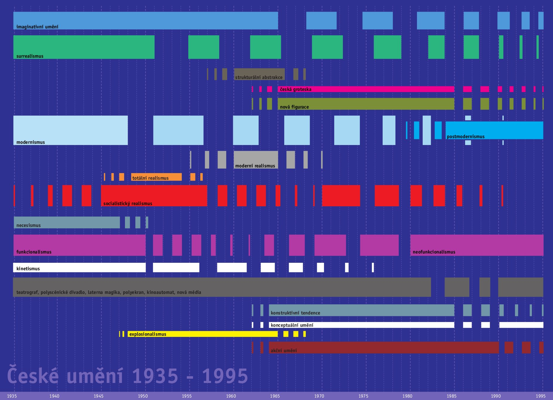 schema 1938-1989